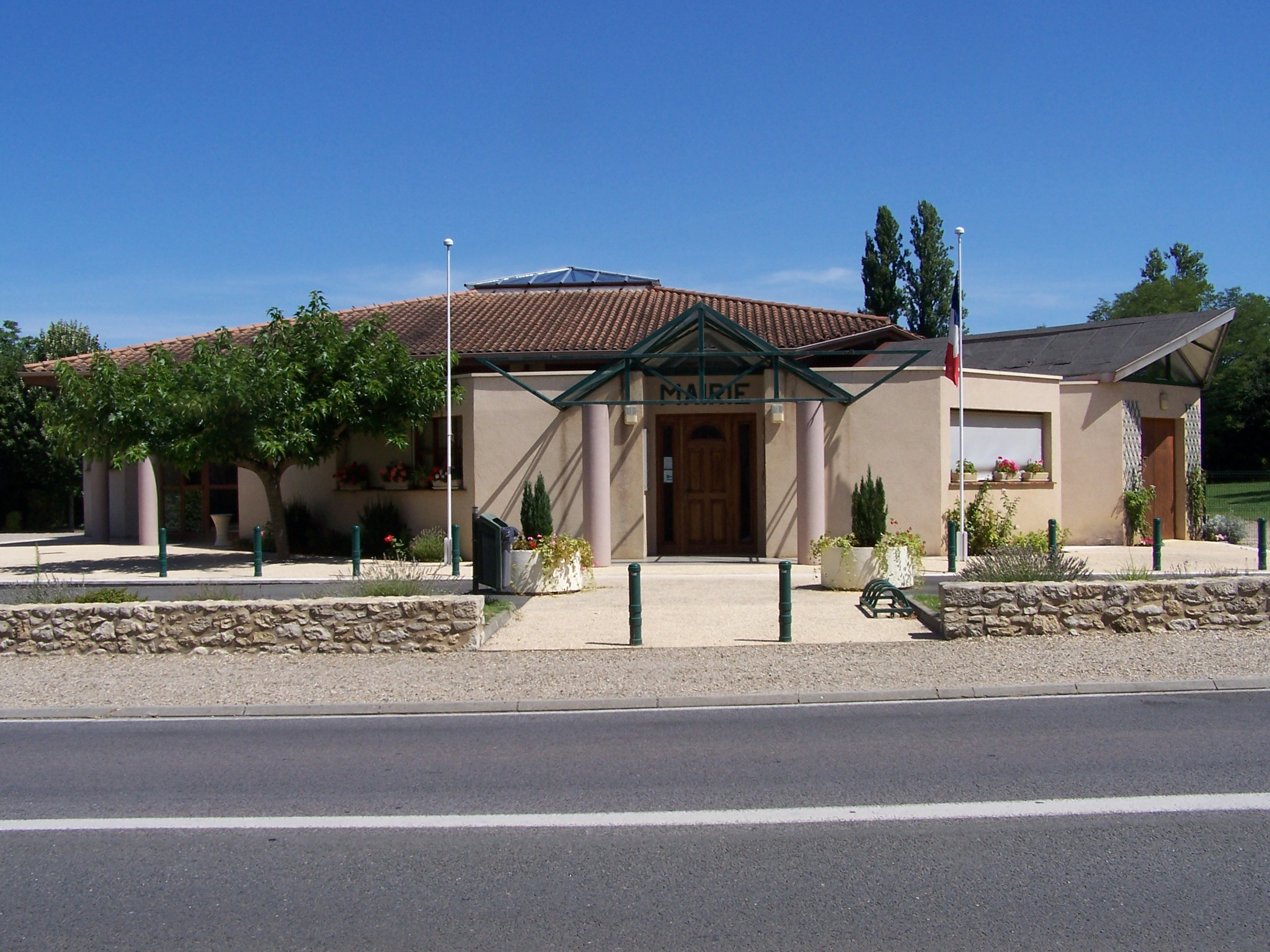 Mairie de Mongauzy, Gironde, France